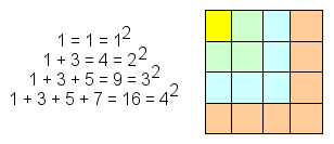 1 + 3 + 5 + ... + 2n-1 = n^2